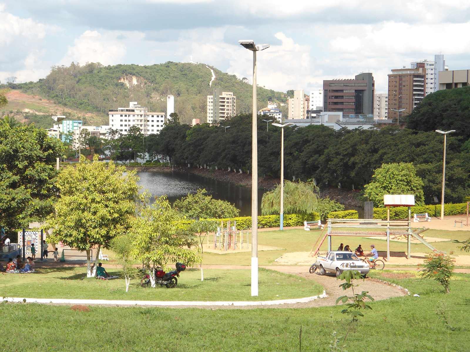 Parque Bariri, localizado na cidade de Pará de Minas, Minas Gerais.